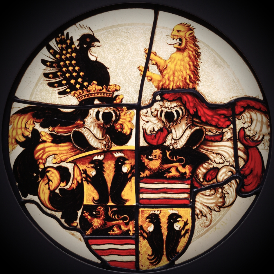 Kabinettscheibe mit dem gemehrten Wappen derer Rummel von Lichtenau